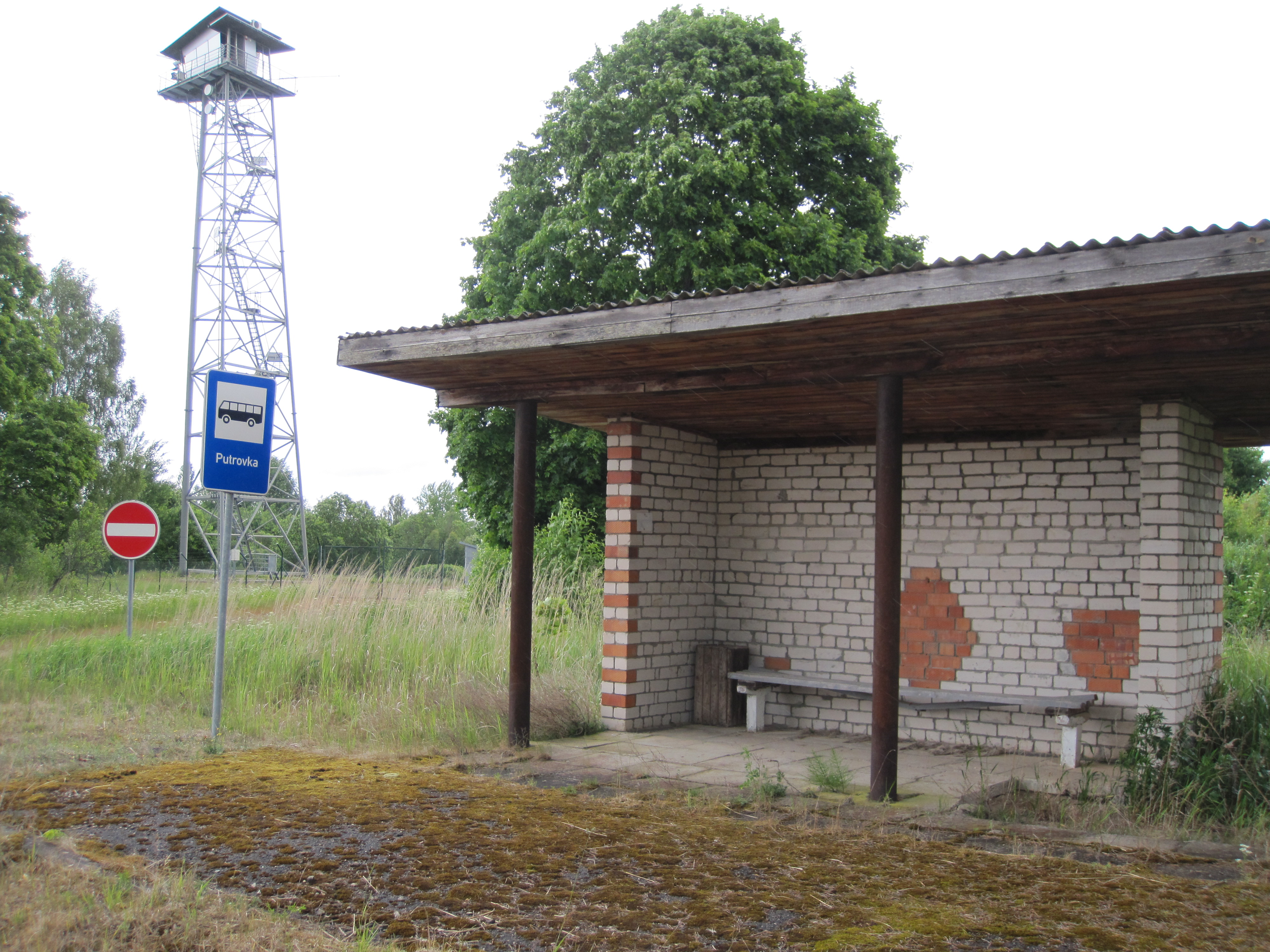 Putrovkas pietura un Jaseņicu novērošanas tornis, 12.06.2016